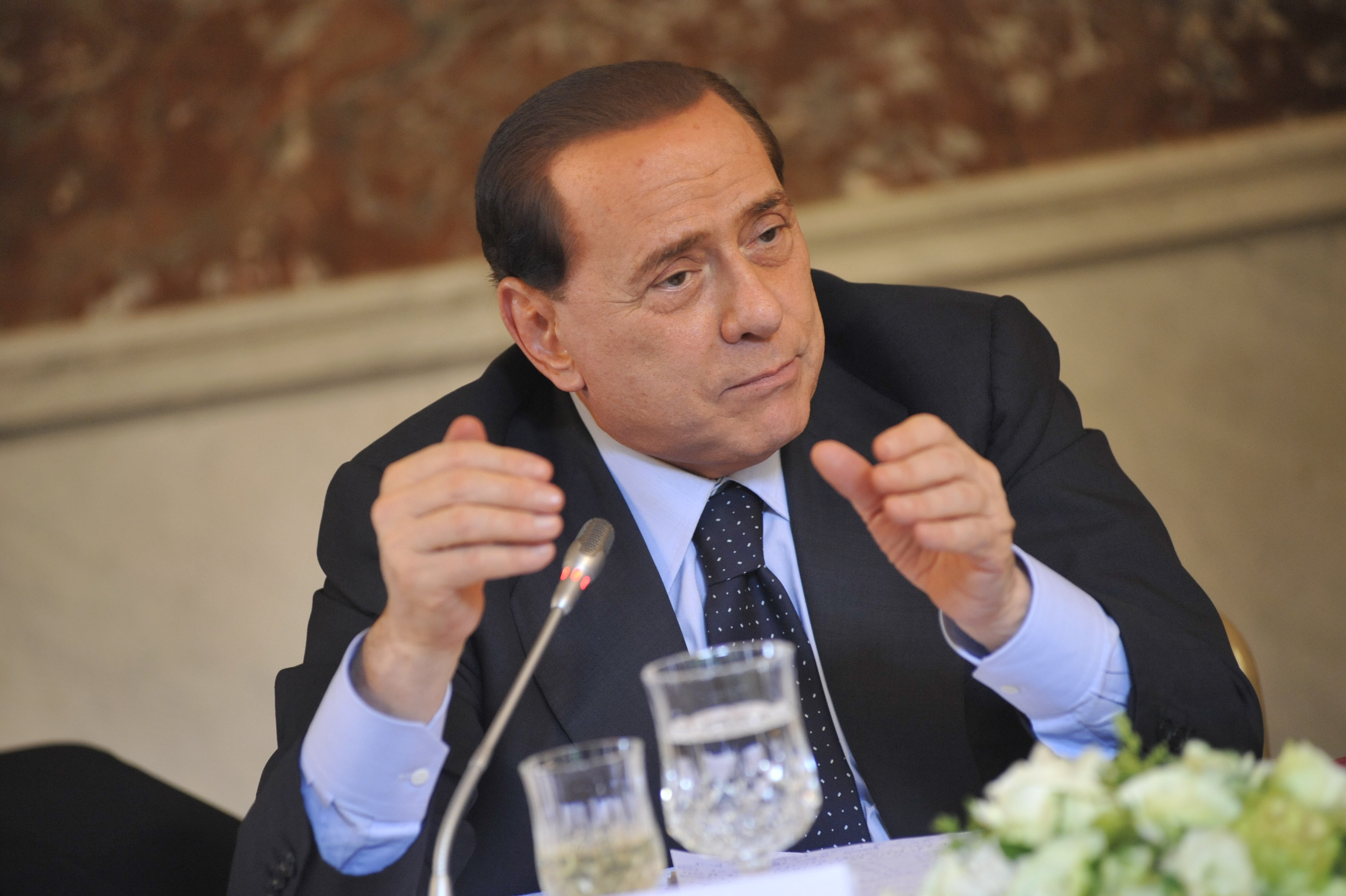 EPP Summit 18 June 2009